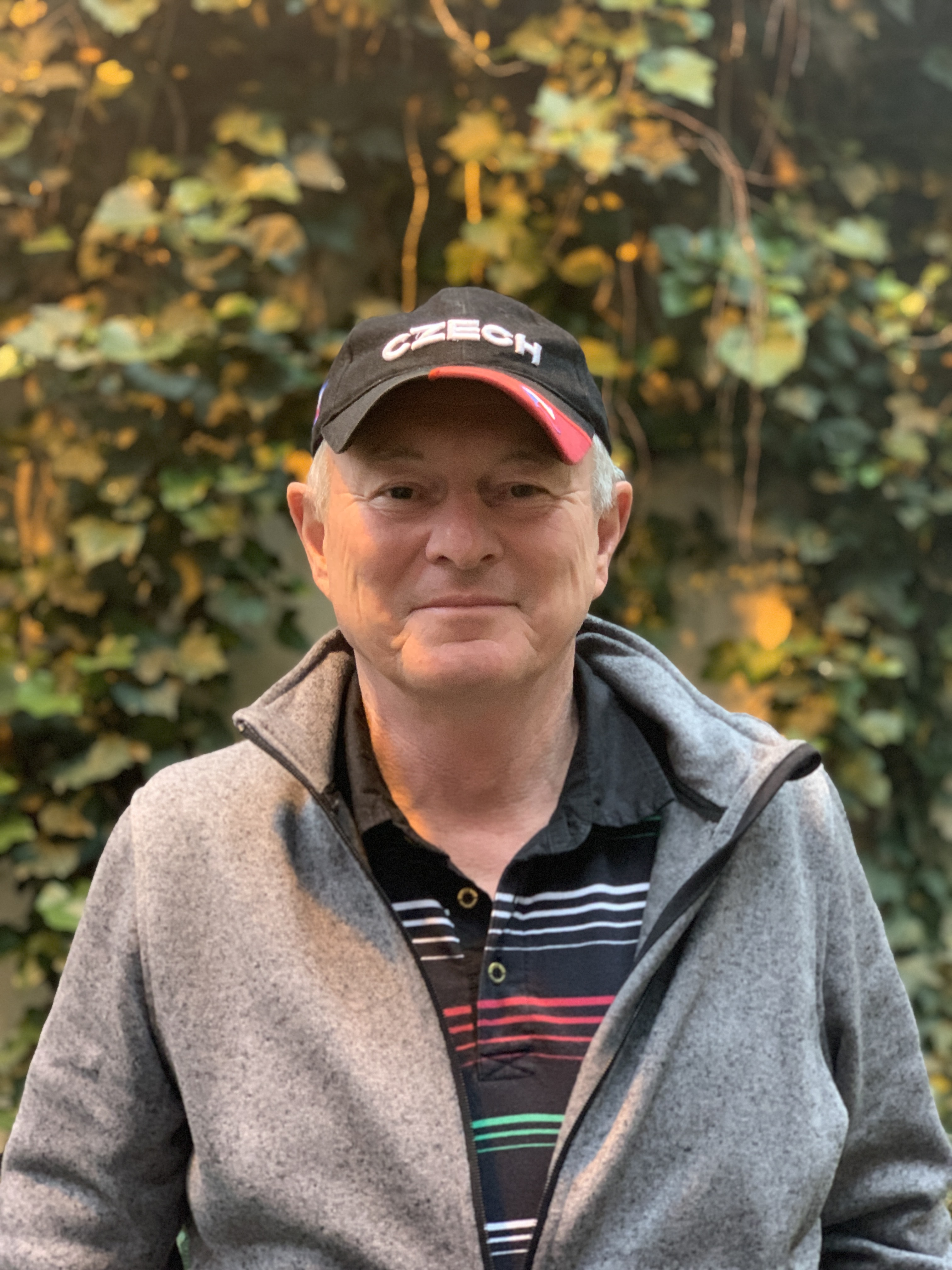 Ing. Pavel Pavel, český politik a experimentální archeolog (22. května 2020, Praha)